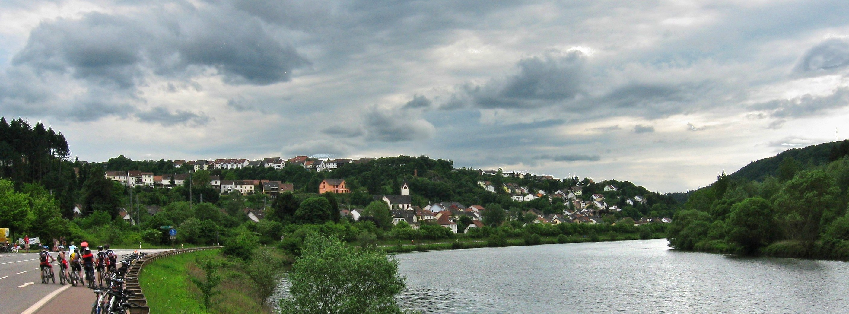 Blick auf Saarhölzbach während der Saarpedal 2009